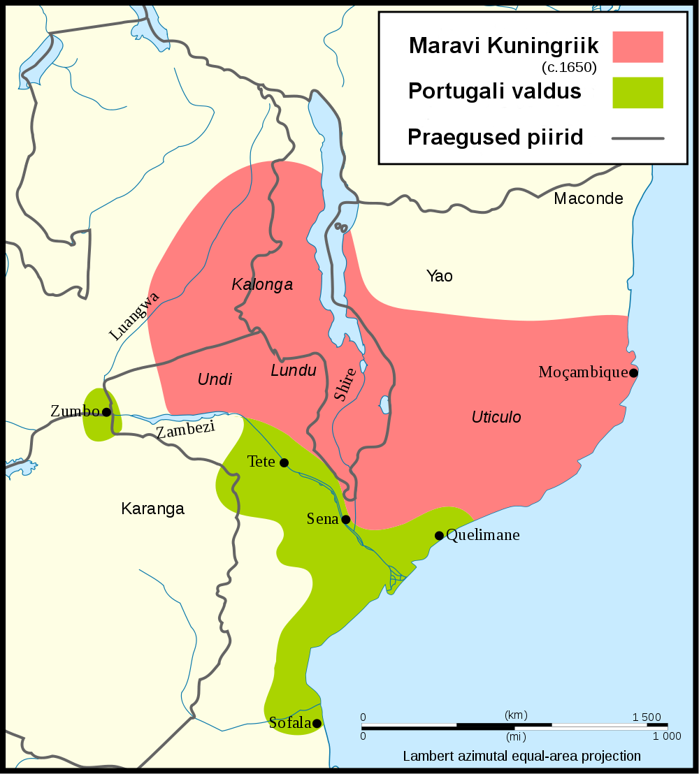 Maravi kuningriik